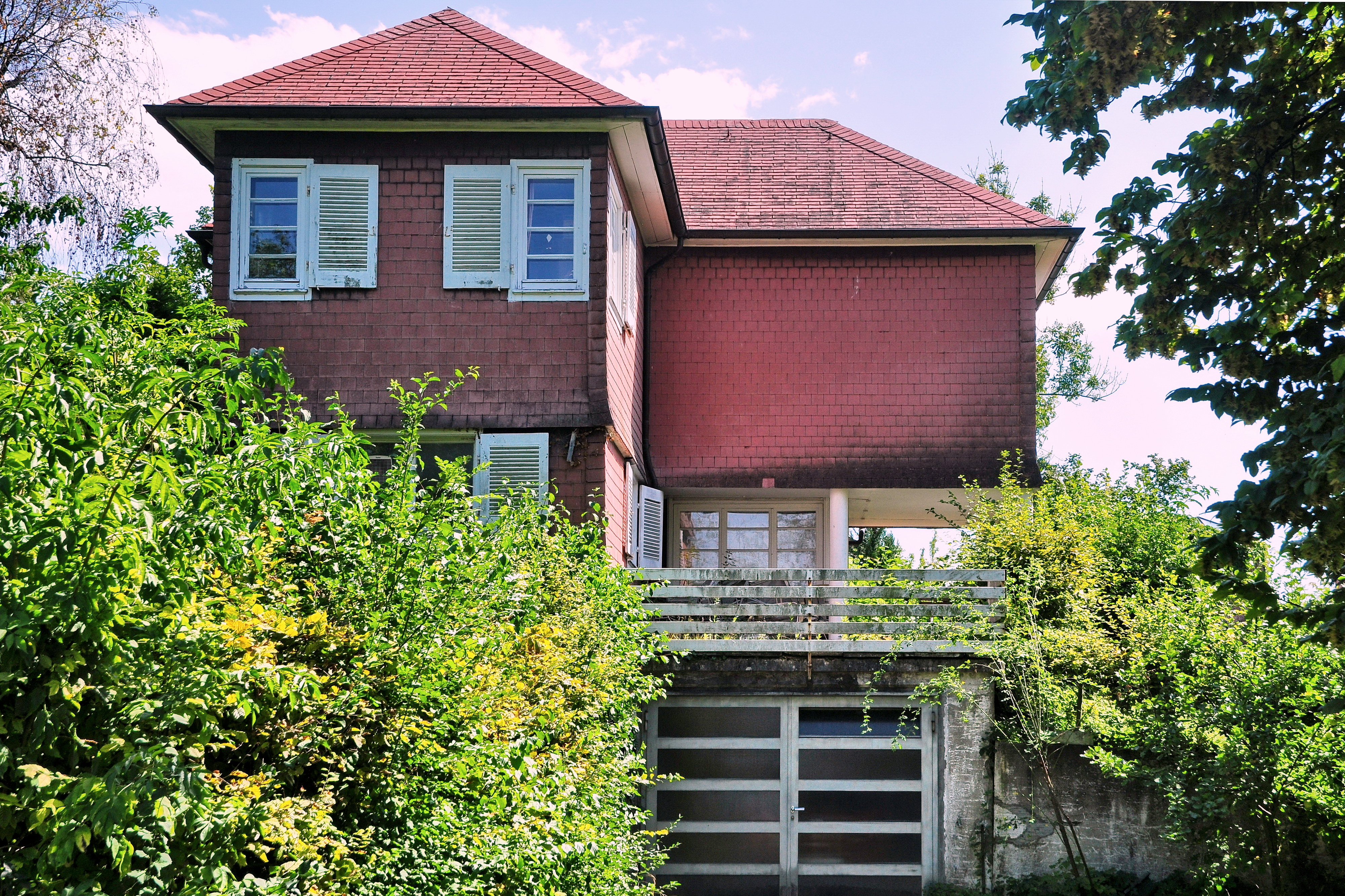 Zumikerstrasse in Küsnacht (Switzerland)